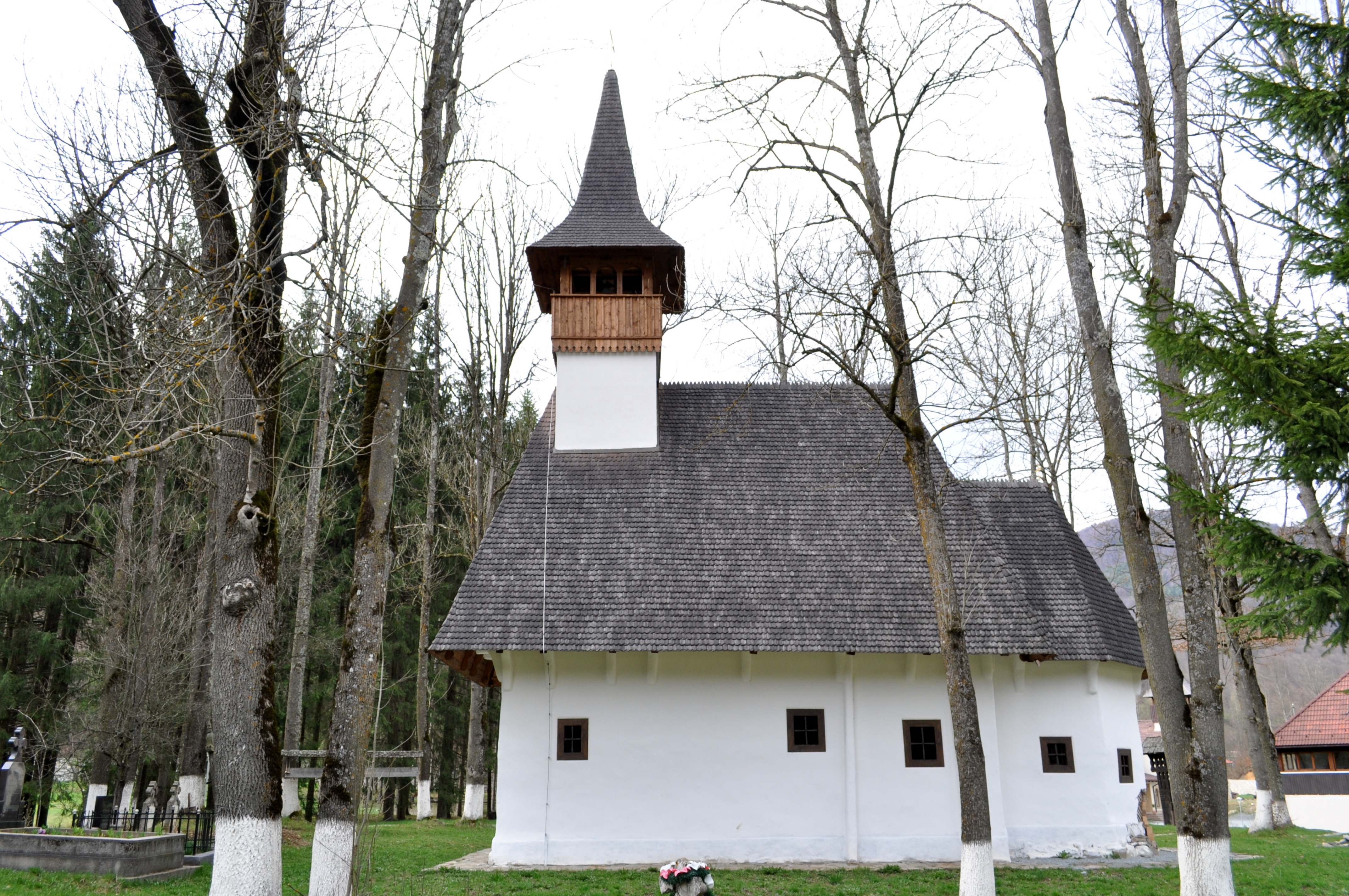 Biserica de lemn "Sf. Nicolae" a mănăstirii Lupşa, sat VALEA LUPŞII; comuna LUPŞA